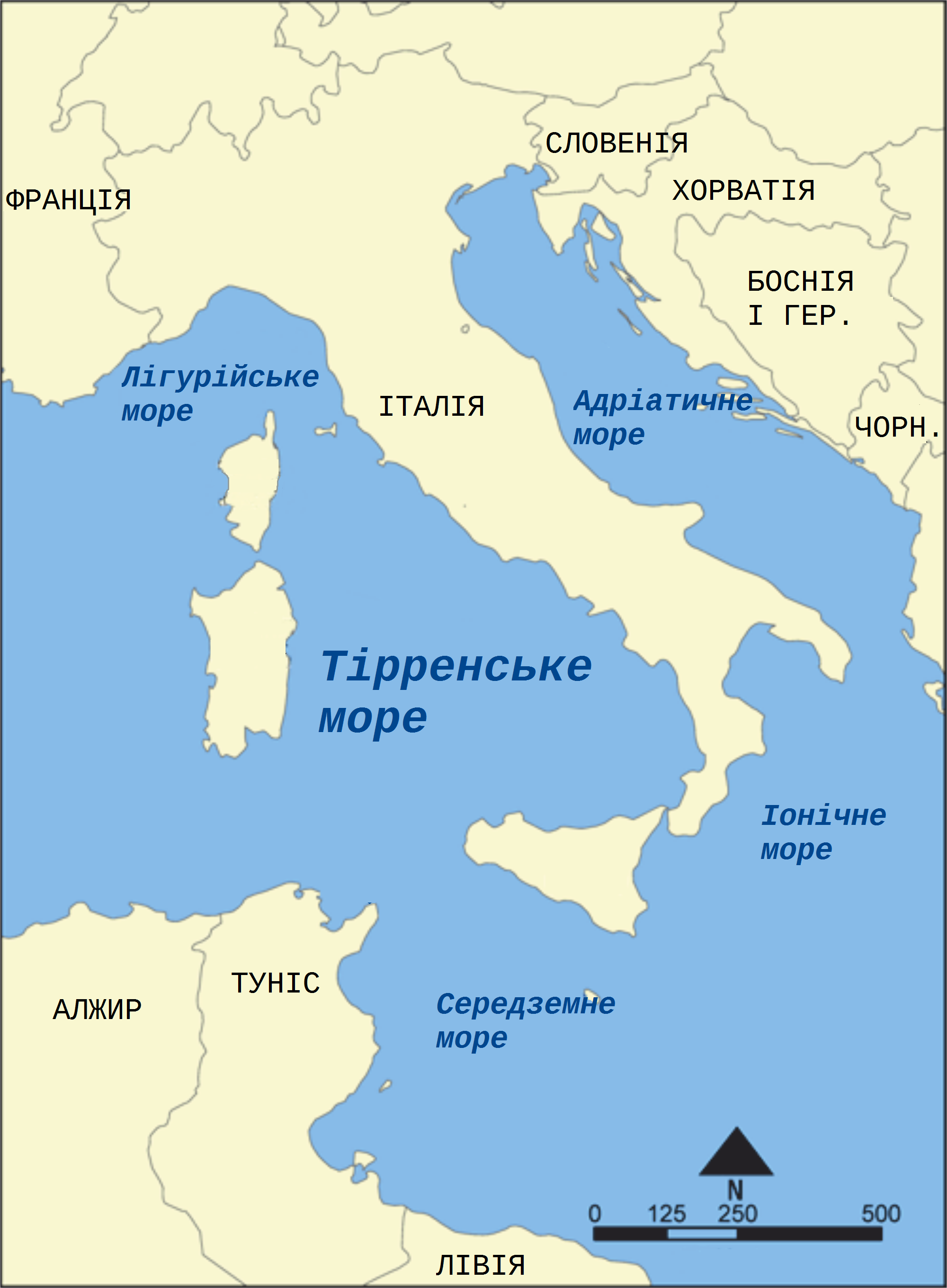 Tirensko more